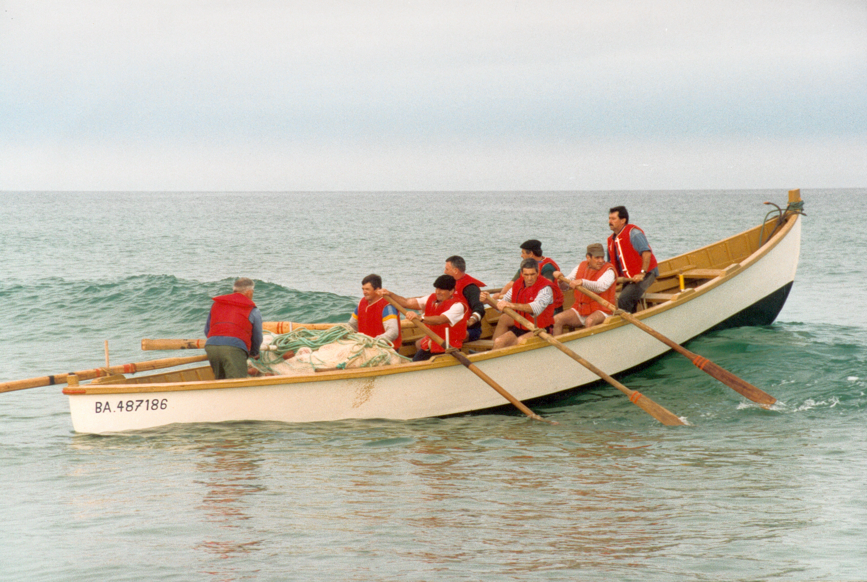 Pêche à la pinasse, pinasse Anne-Marie ; Cap de l'Homy, Lit-et-Mixe, France